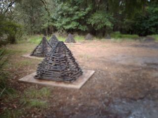 sculpture at Victoria Rock Lookout